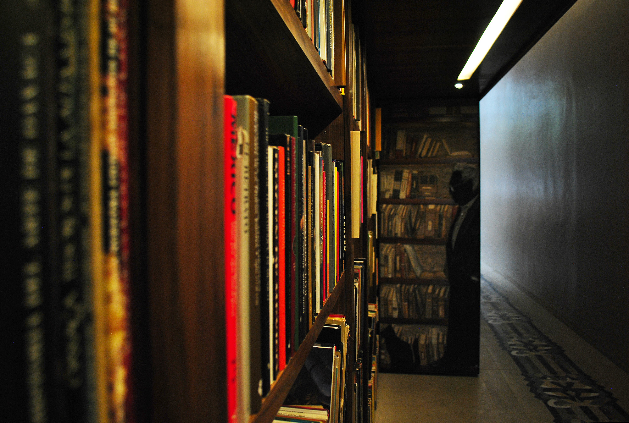 Imagen de un estante de la Biblioteca Personal Carlos Monsiváis en la Biblioteca México José Vasconcelos.